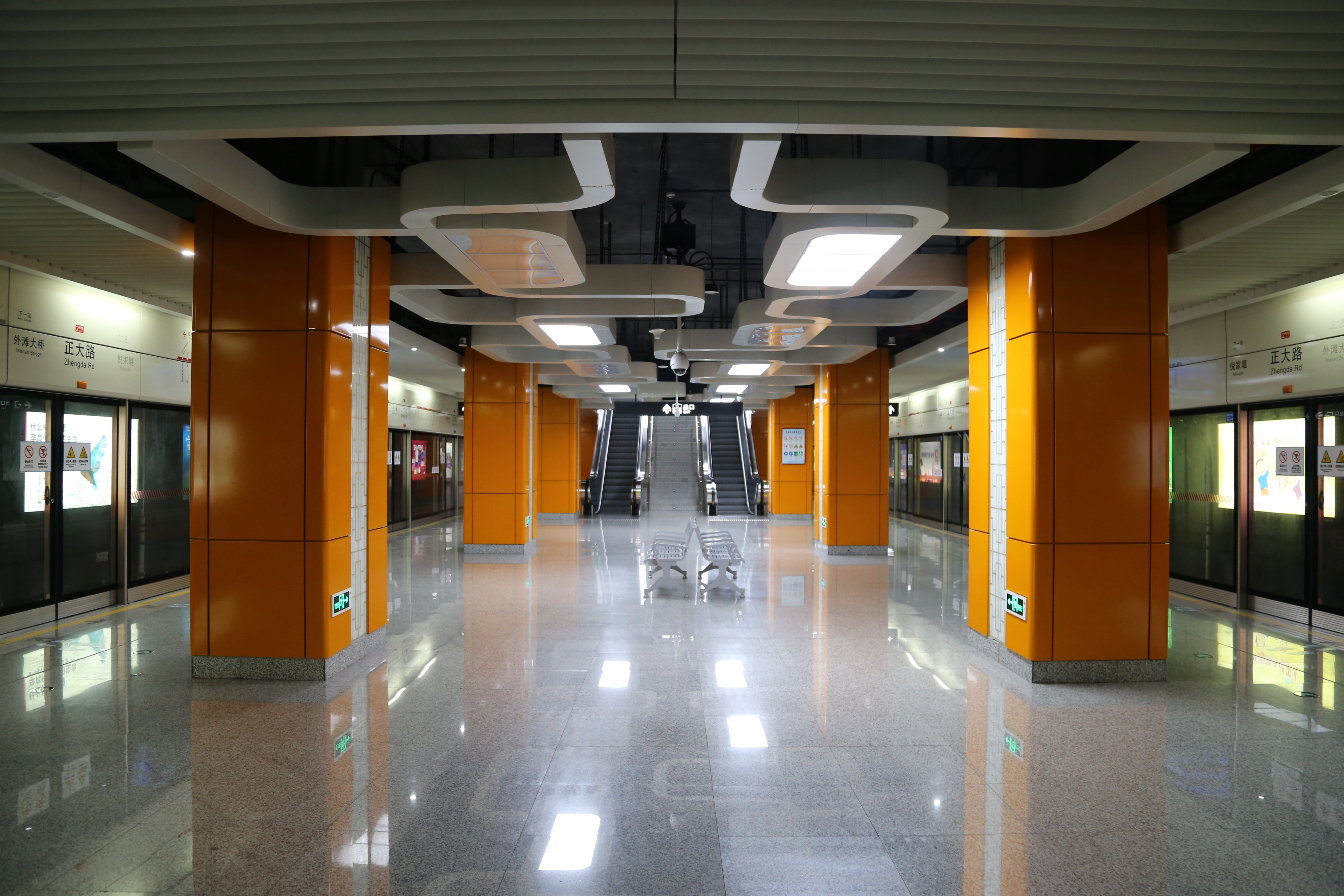 正大路站站台